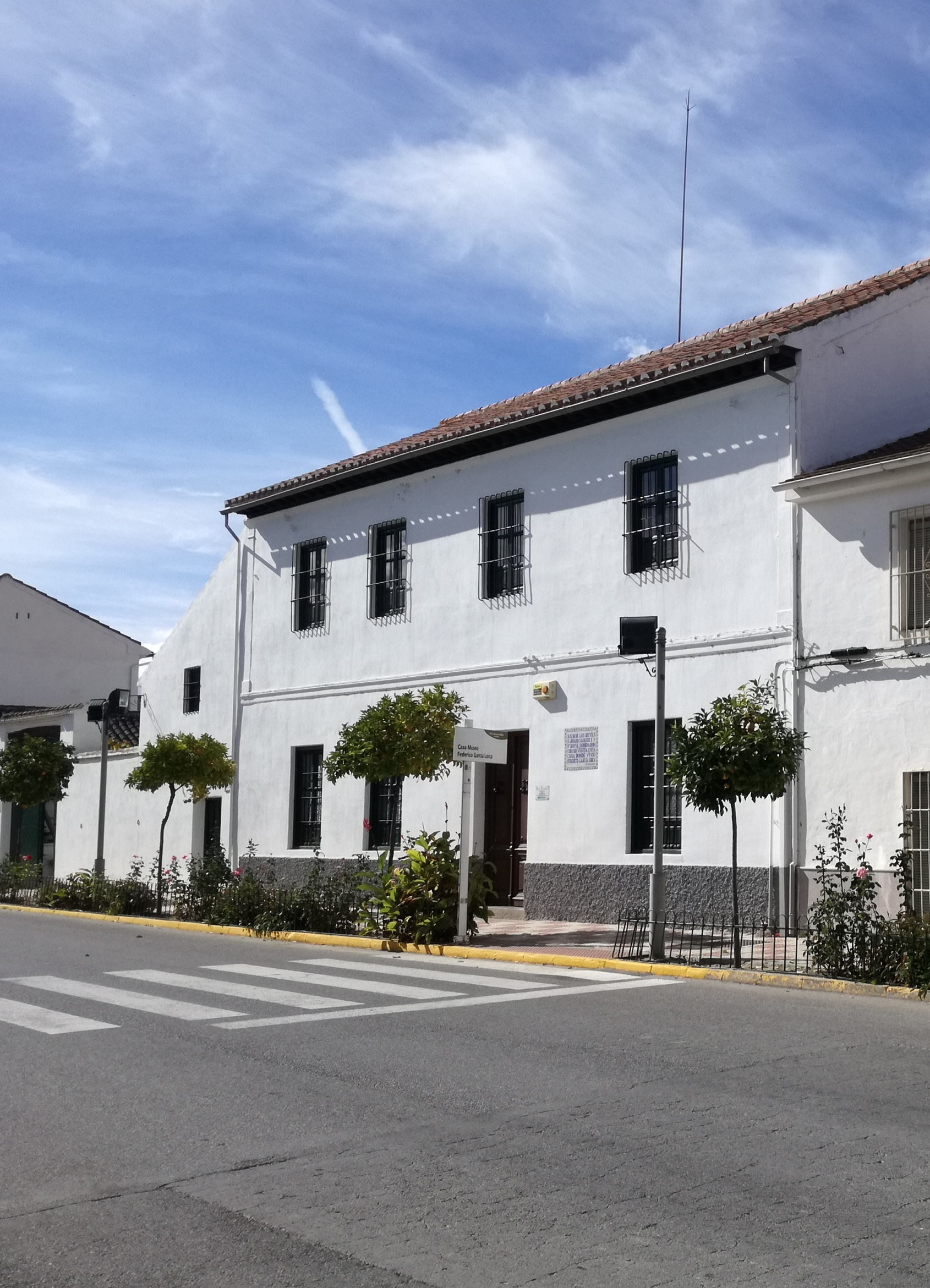 Esta era la casa en donde Isabel García Lorca pasó los veranos de su infancia en compañía de sus padres y hermanos. Desde 1018 se ha convertido en un museo dedicado a Federico García Lorca.